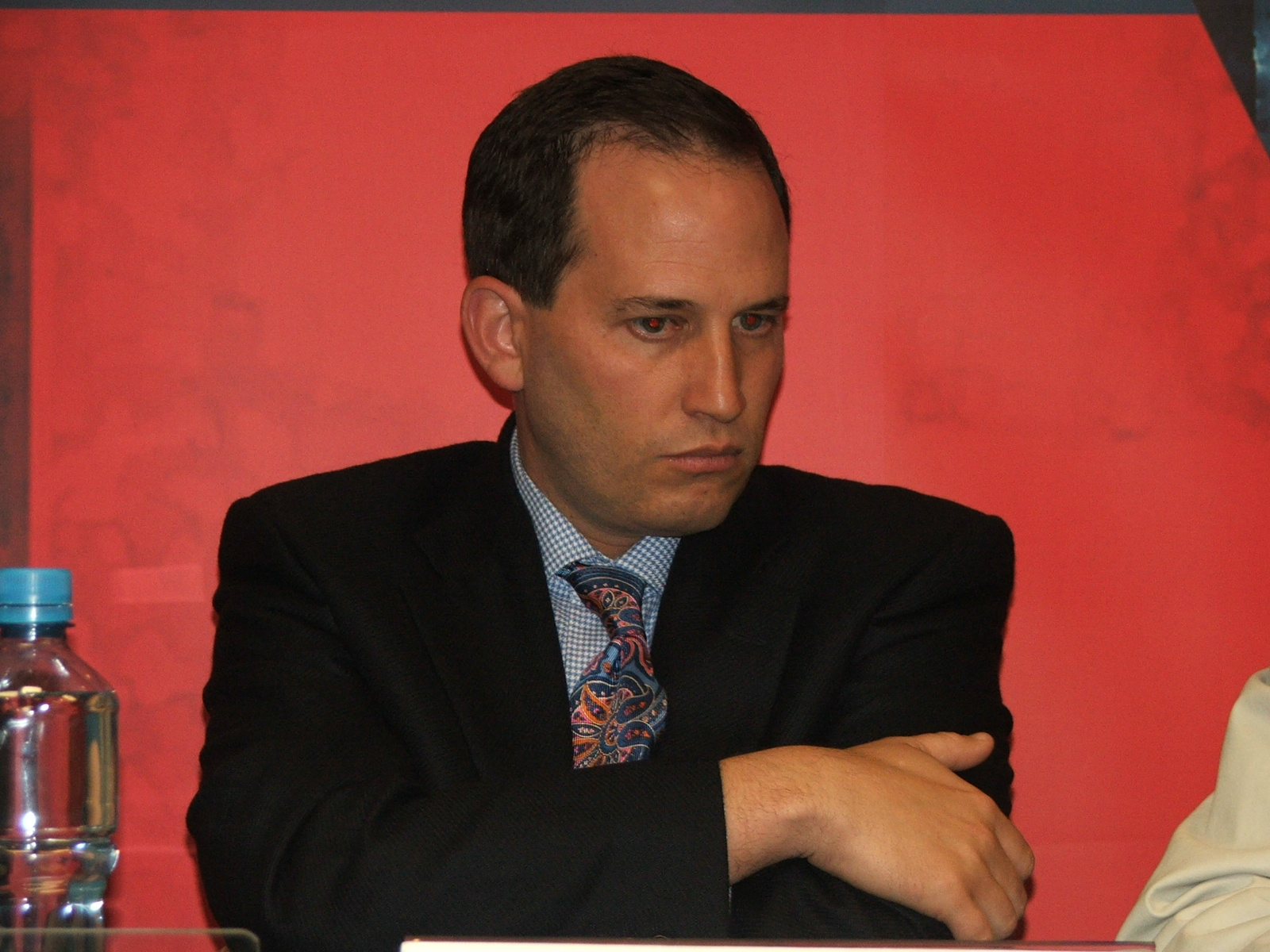 Foto de Gabriela Bautista en el "Hey Festival" en Veracruz, México.